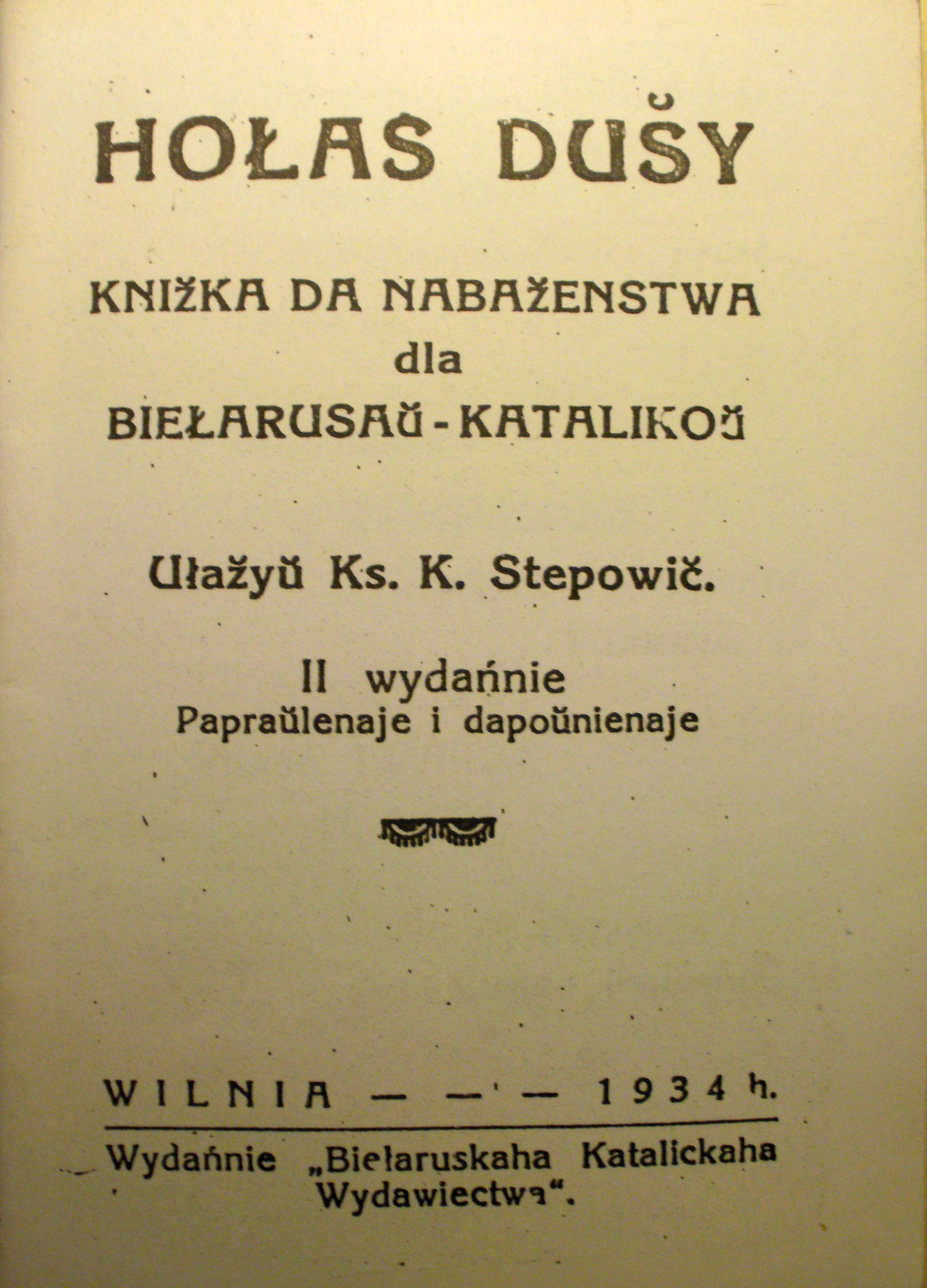 Кнiга Канстанціна Стаповiча(Казімір Сваяк):"Голас душы. Набажэнства для беларусаў-каталікоў"(2-е выданне).